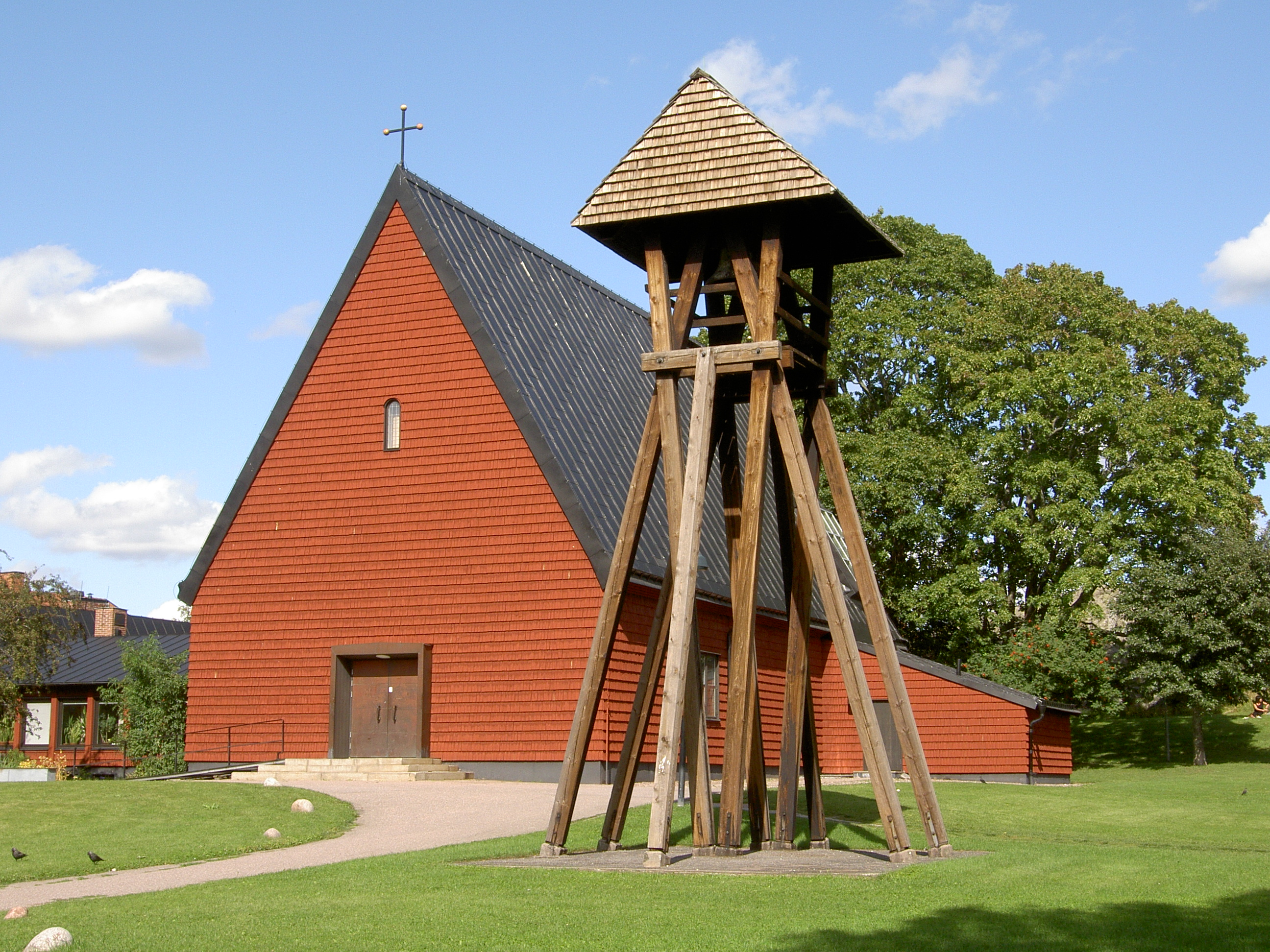 Salabackekyrkan med klockstapel